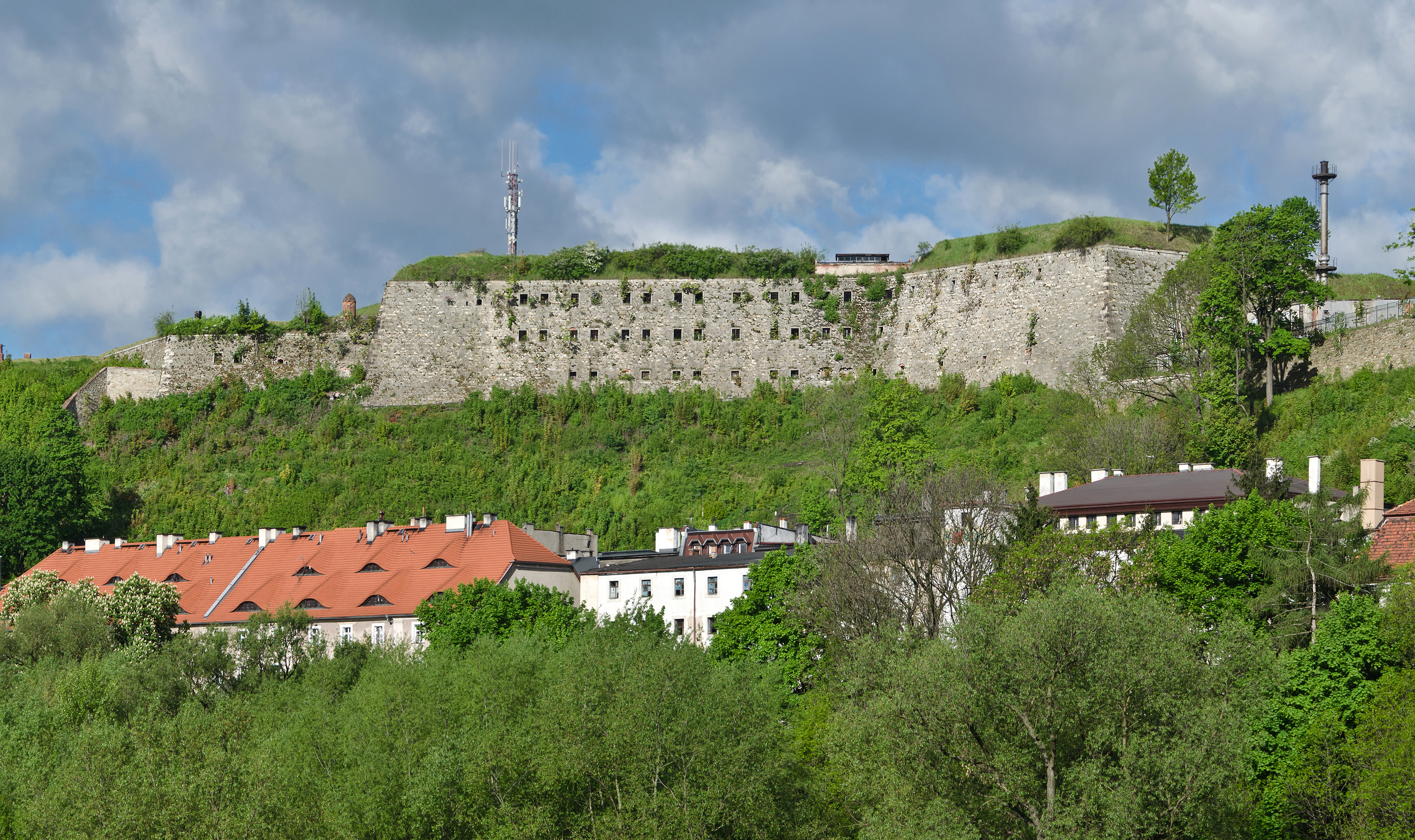 Kłodzko, cytadela (dec.twierdza), XVII, XVIII